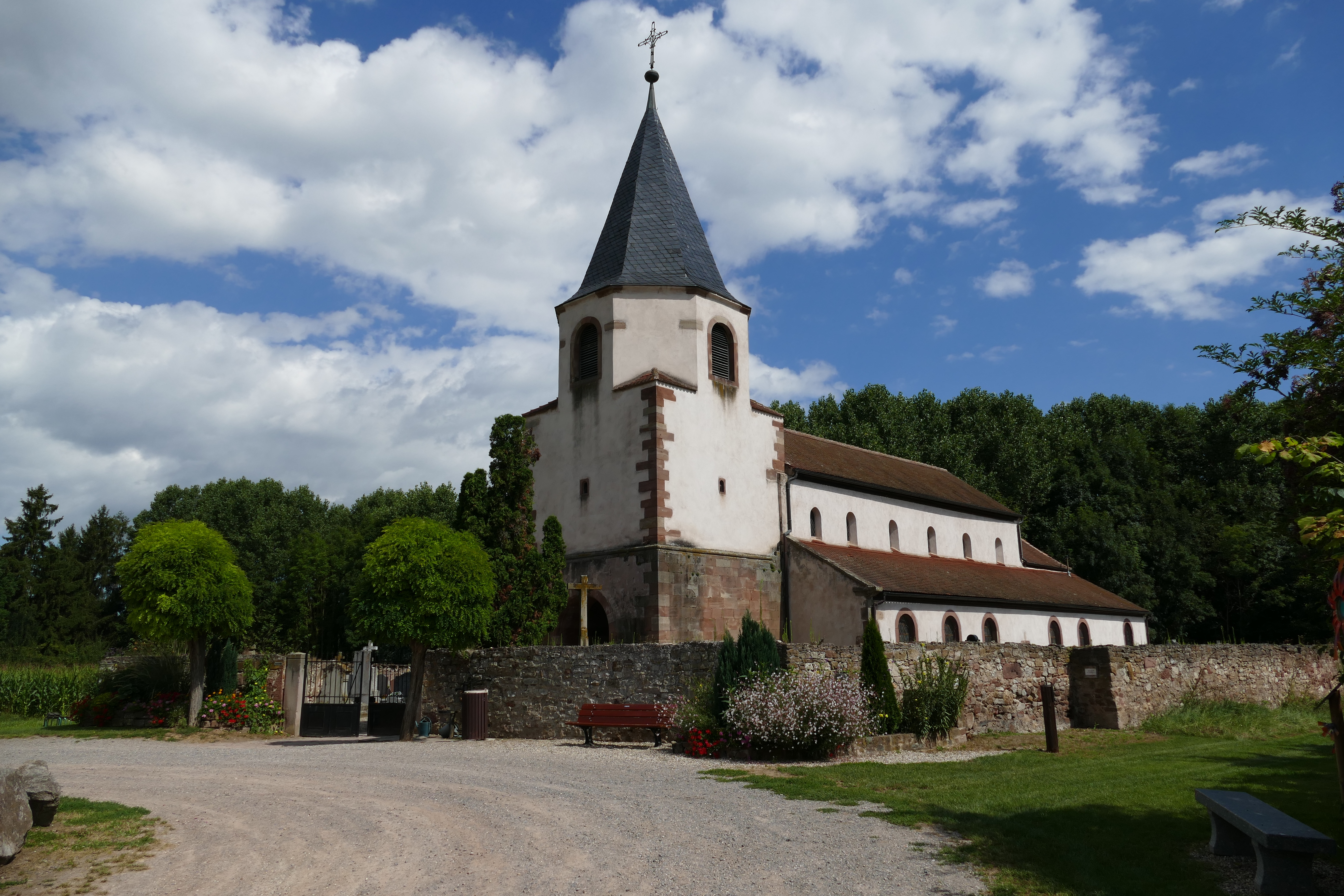 Alsace, Bas-Rhin, Avolsheim, Molsheim, Église Saint-Pierre dite Dompeter (PA00084594, IA67006175).